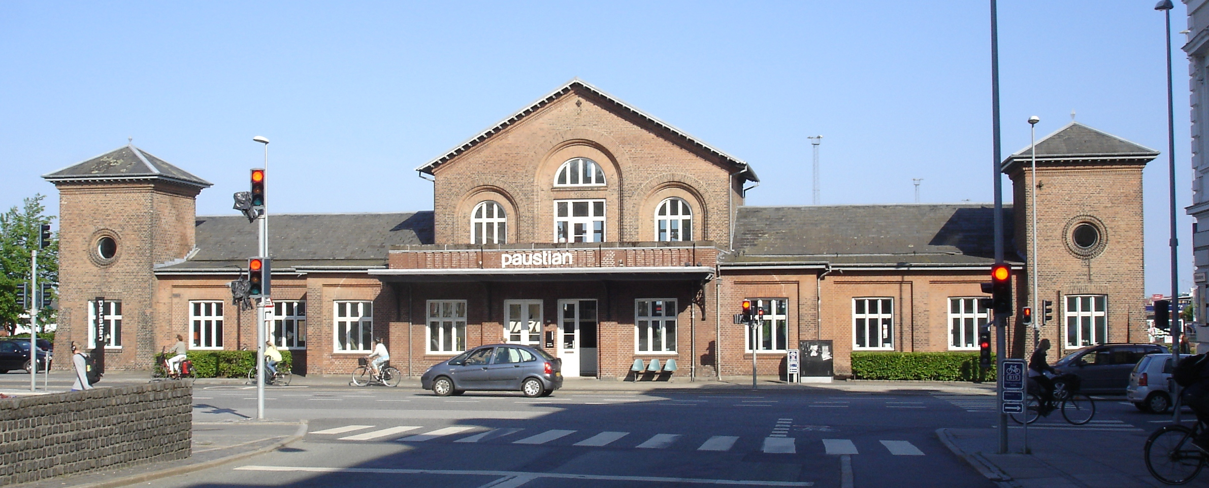 Østbanetorvet Station fra vejsiden